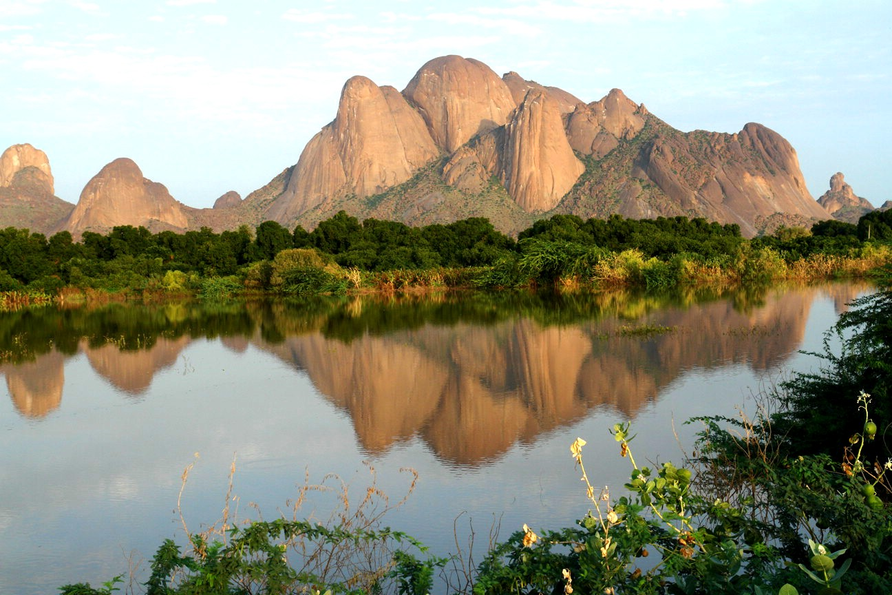 نهر القاش وتلال التاكا